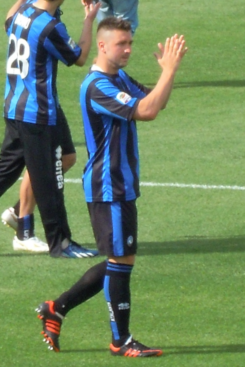 Daniele Capelli, calciatore italiano